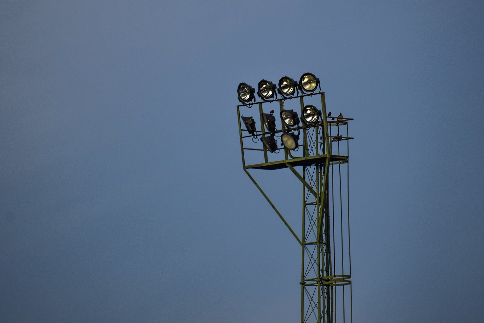 Hasselt